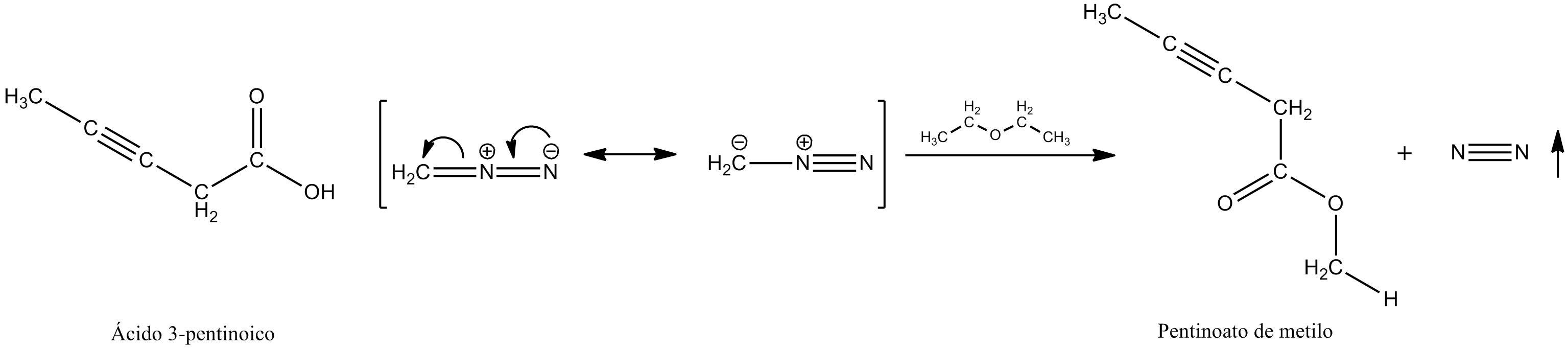 Sintesis de metilésteres con diazometano